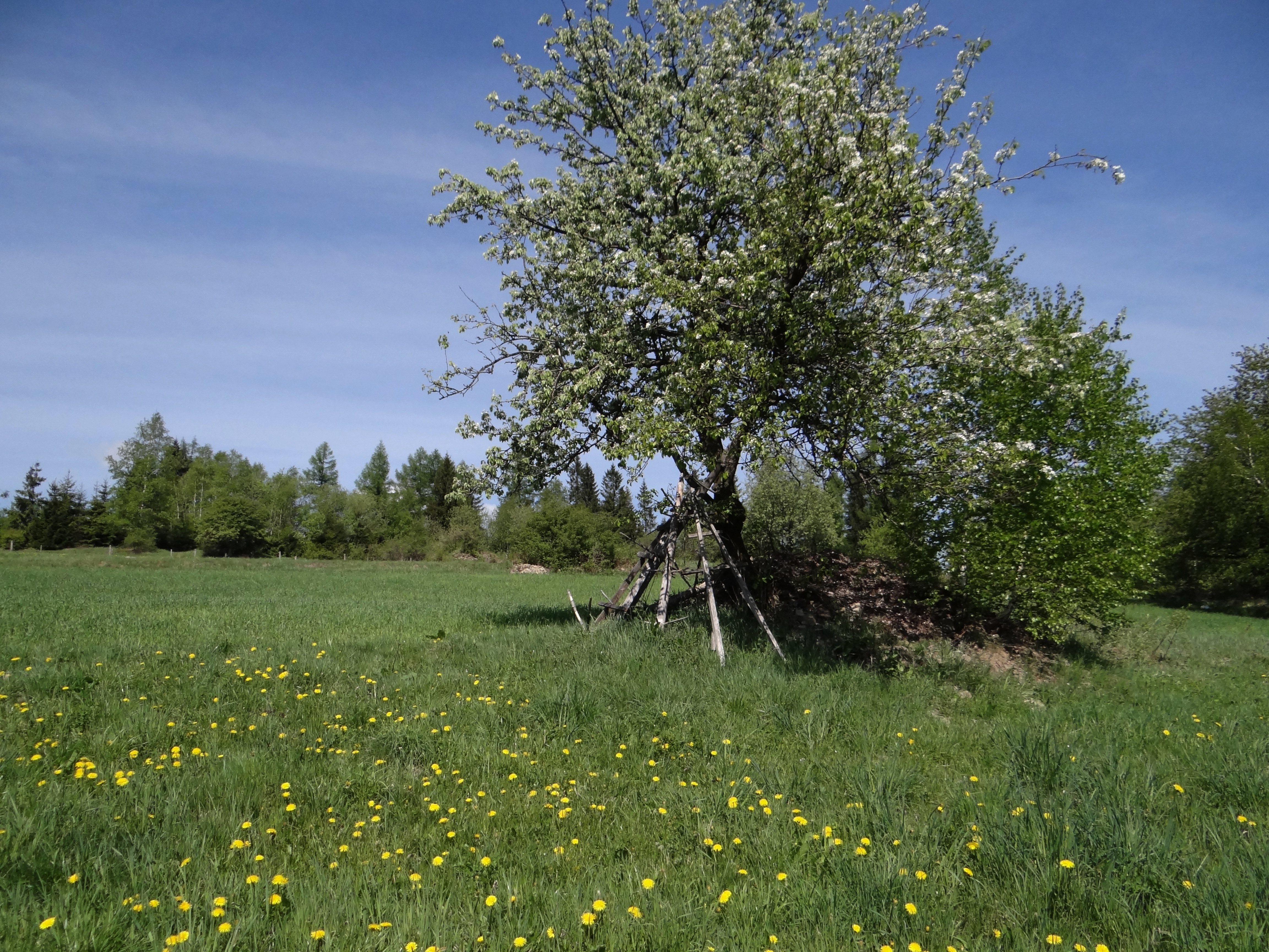 Jaworzyński Wierch w Beskidzie Makowskim